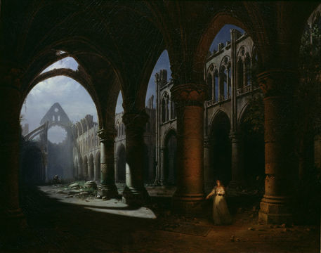 Peinture d'Hippolyte Sebron réalisée en 1848 et représentant l'intérieur d'une abbaye en ruines.